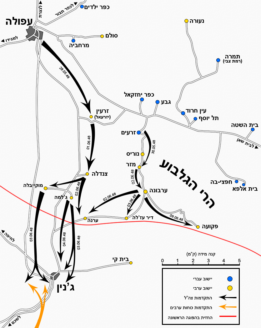 מפת הקרבות באזור ג'נין במלחמת העצמאות